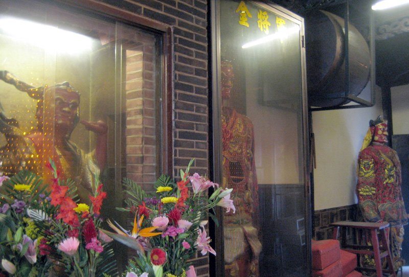 南瑤宮順風耳